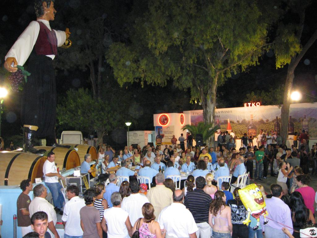 Ambiance nocturne au festival du vin de Limassol